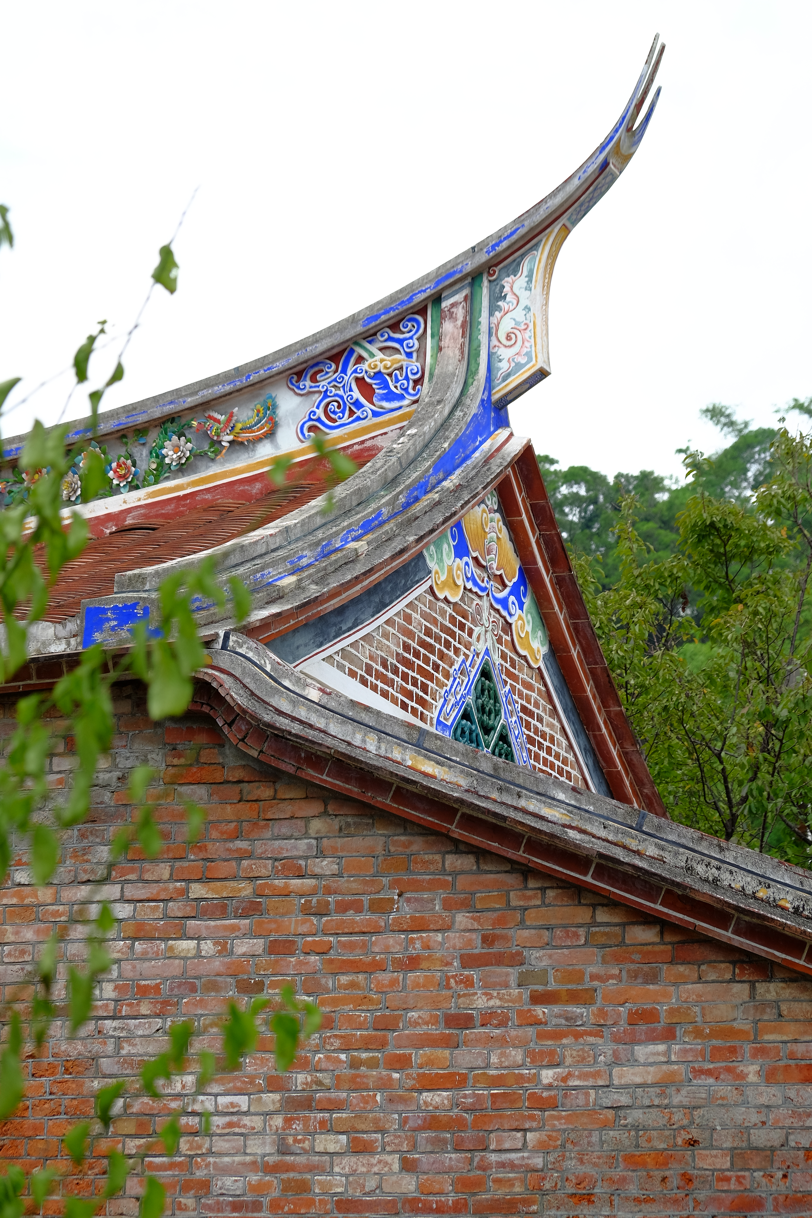 泰山明志書院